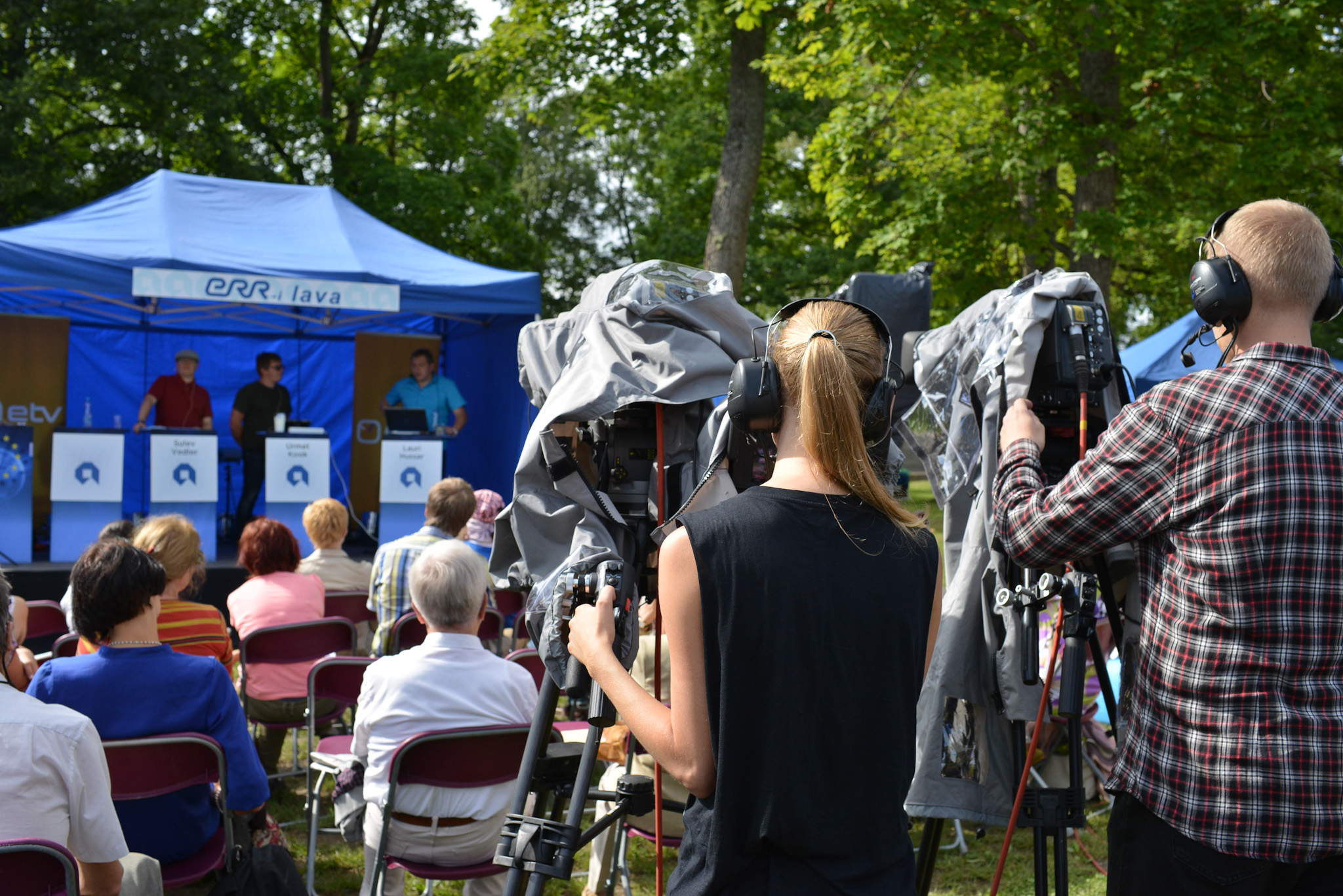 Arvamusfestival 2014